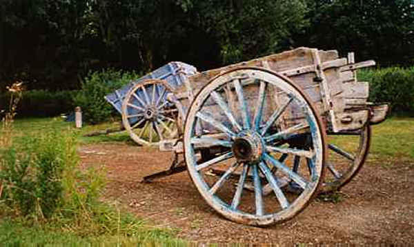 Twee boerenkarren in Normandie